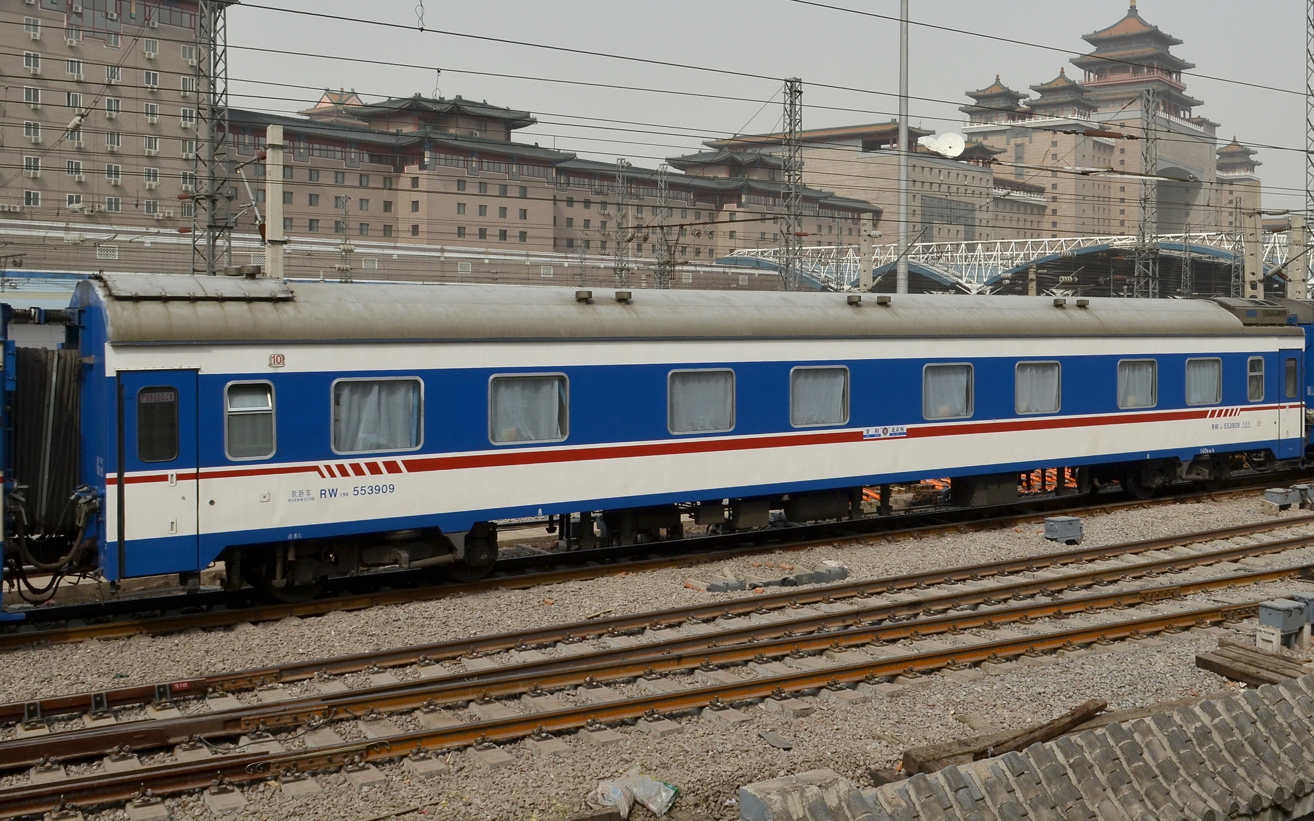 特快列车编组中的RW19K型软卧车，拍摄于北京西客站